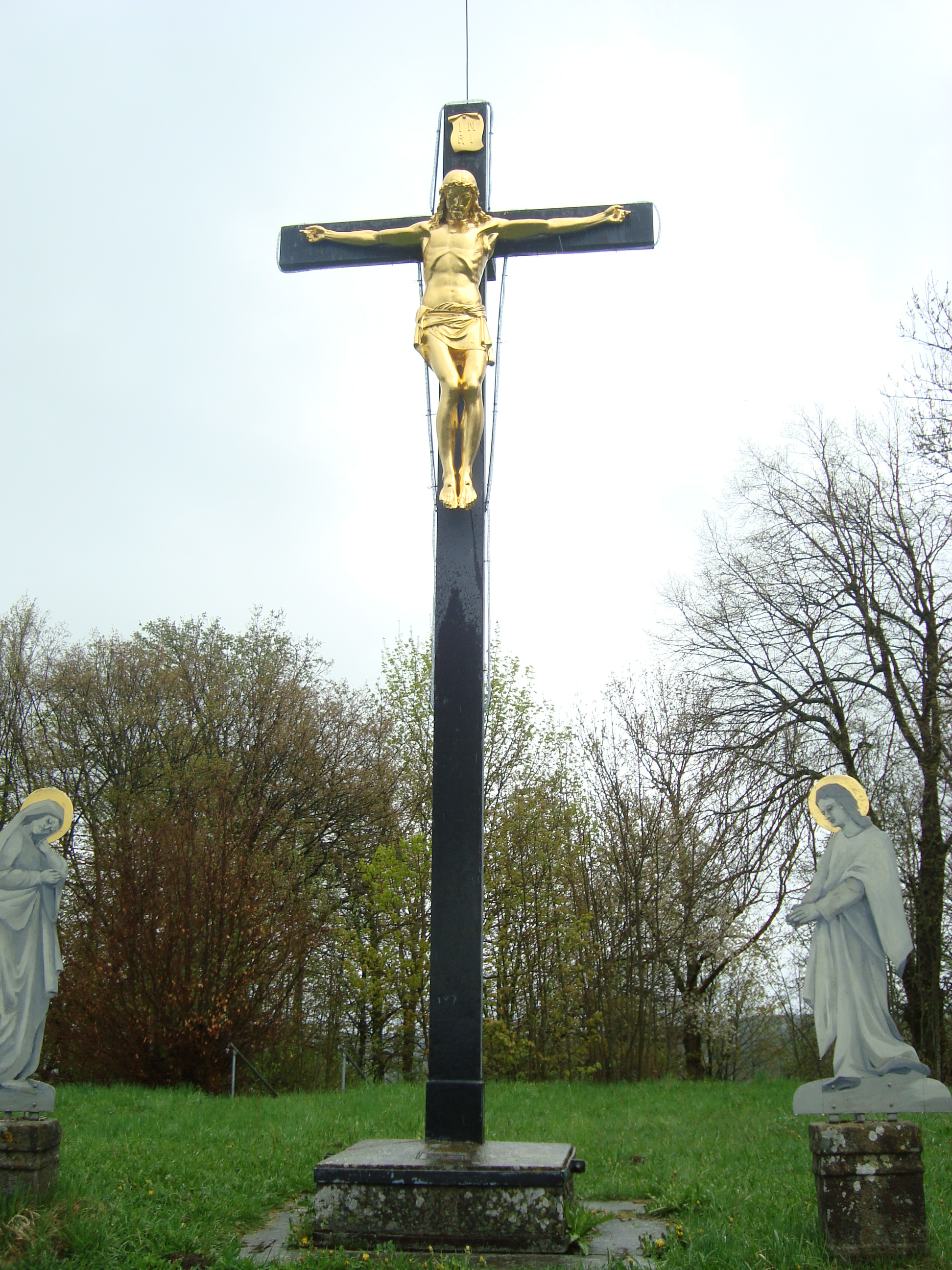 Gipfel des Schloßberges bei Tännesberg in Bayern mit 692m ü.NN